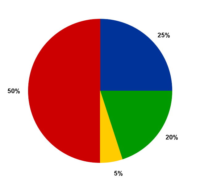 Fuentes de financiación de la Iglesia católica en España. Fuentes: Programa para el Sostenimiento Económico de la Iglesia. «Fuentes de financiación» Giménez Barriocanal, Fernando (2007). La Financiación de la Iglesia Católica en España. Editorial EDICE. Leyenda: Donaciones directas de los fieles Asignación Tributaria Rendimientos del patrimonio eclesiástico Otras fuentes de financiación